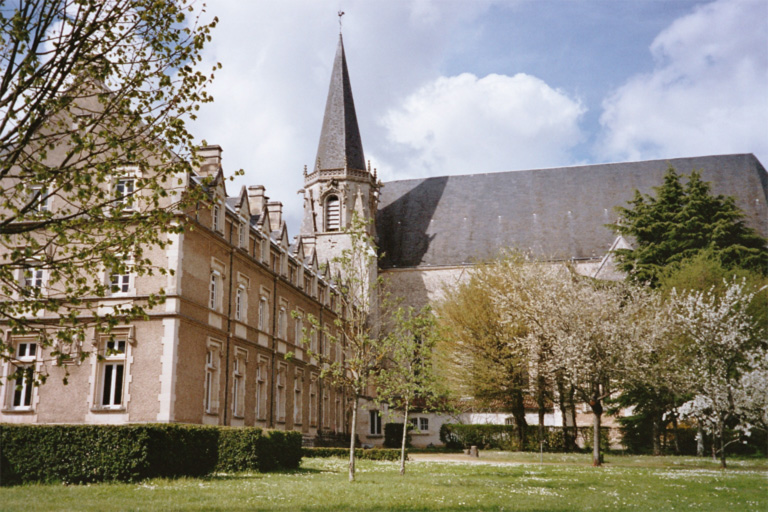 L'abbaye Saint-Martin vue des jardins